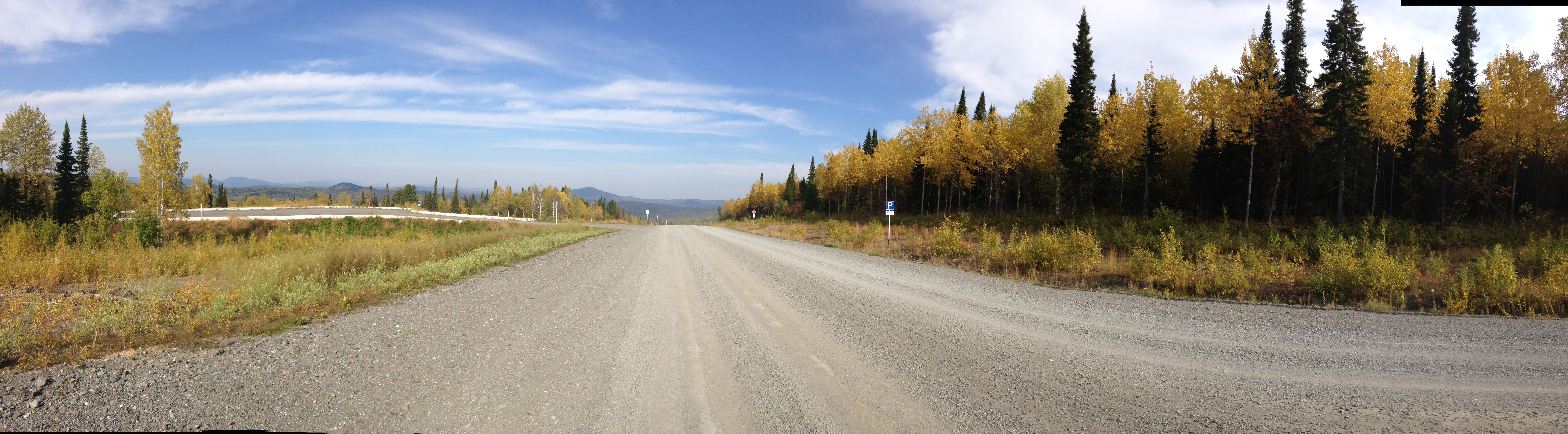 Панорама автомобильного перевала через хребет Бийская грива на дороге Горно-Алтайск — Турочак — Таштагол в сентябре 2014 года.